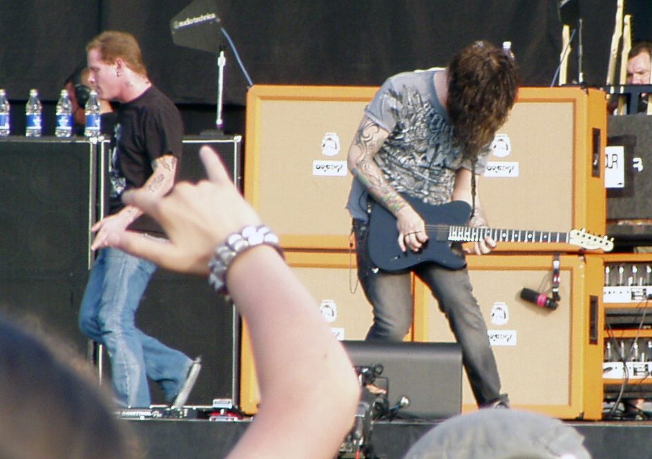 Gli Stone Sour all'Heineken Jammin' Festival 2007